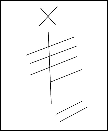 127 en numération forestière